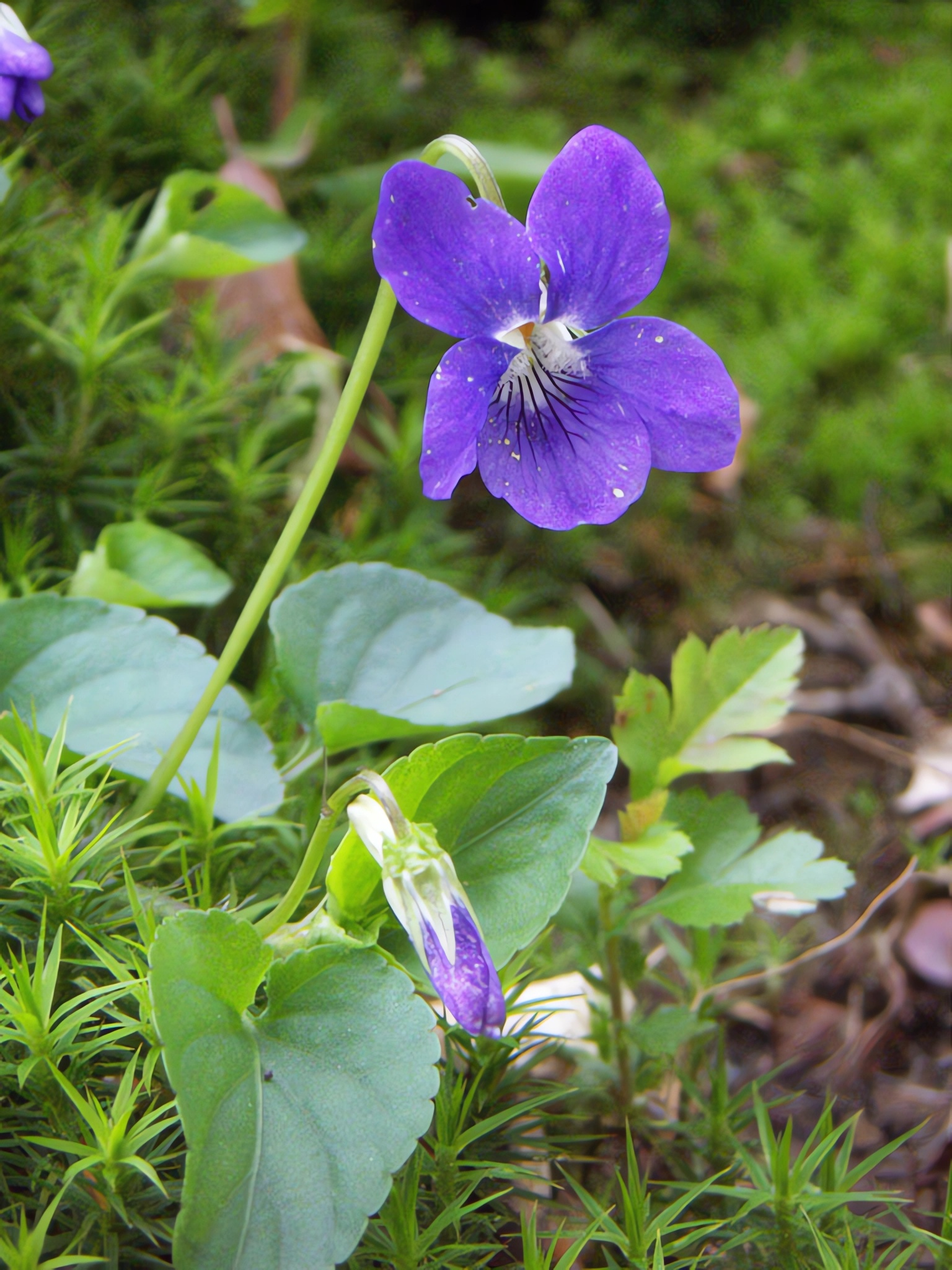 Hain-Veilchen (Viola riviniana)